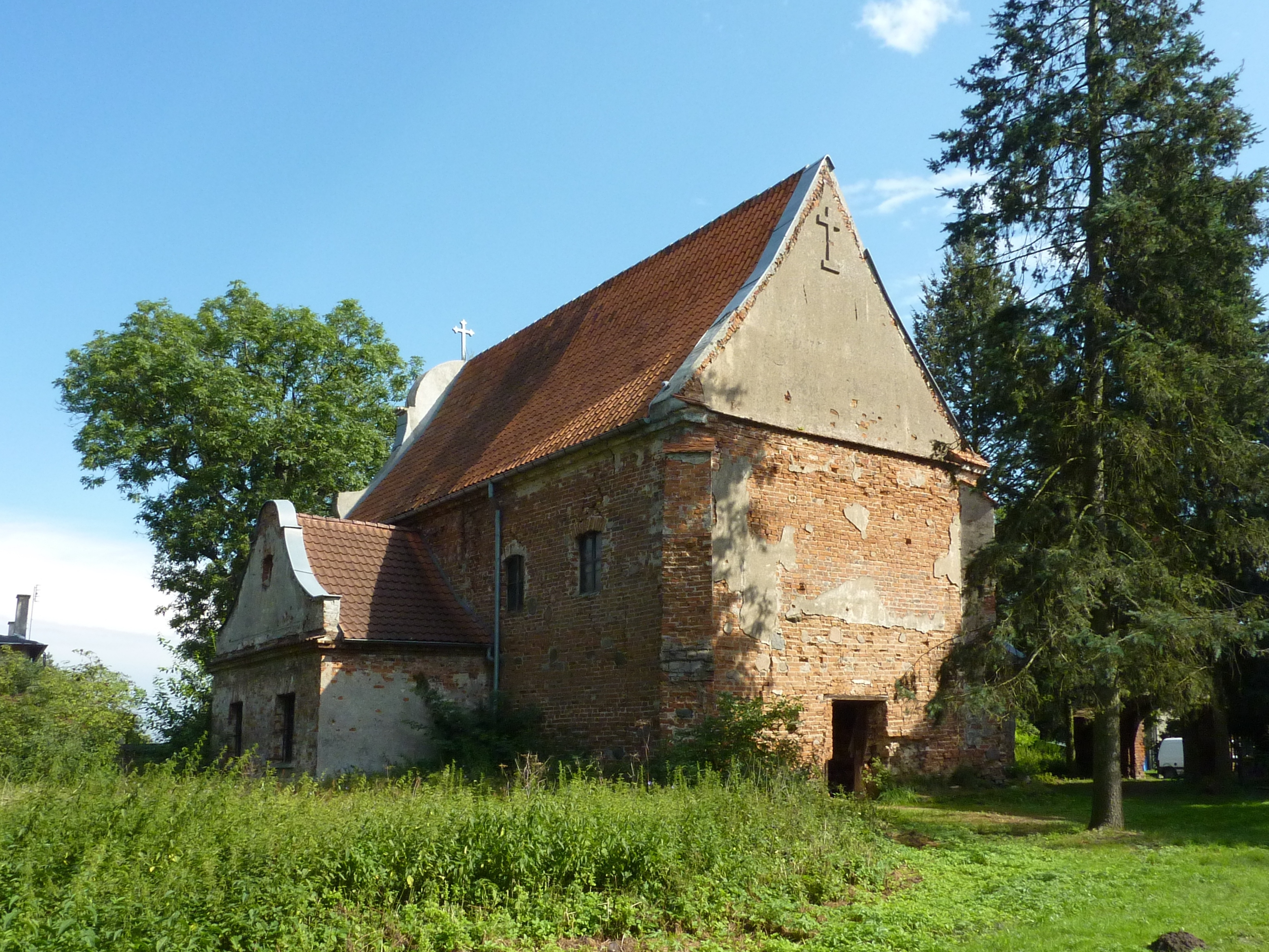 Owińska, ul. Poznańska 22 - kościół parafialny pw. św. Mikołaja z połowy XVI w. (zabytek nr 2539/A)